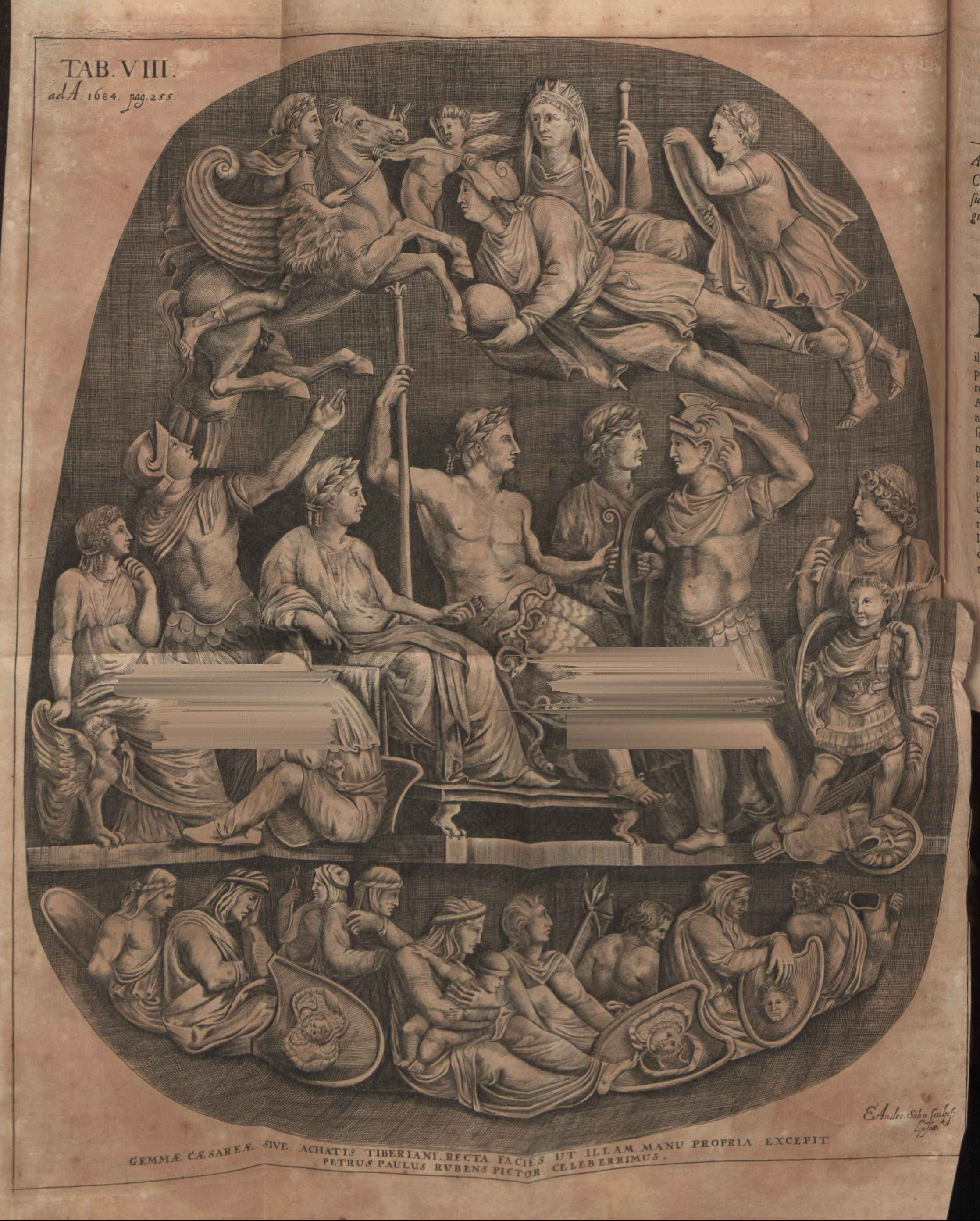 Illustration